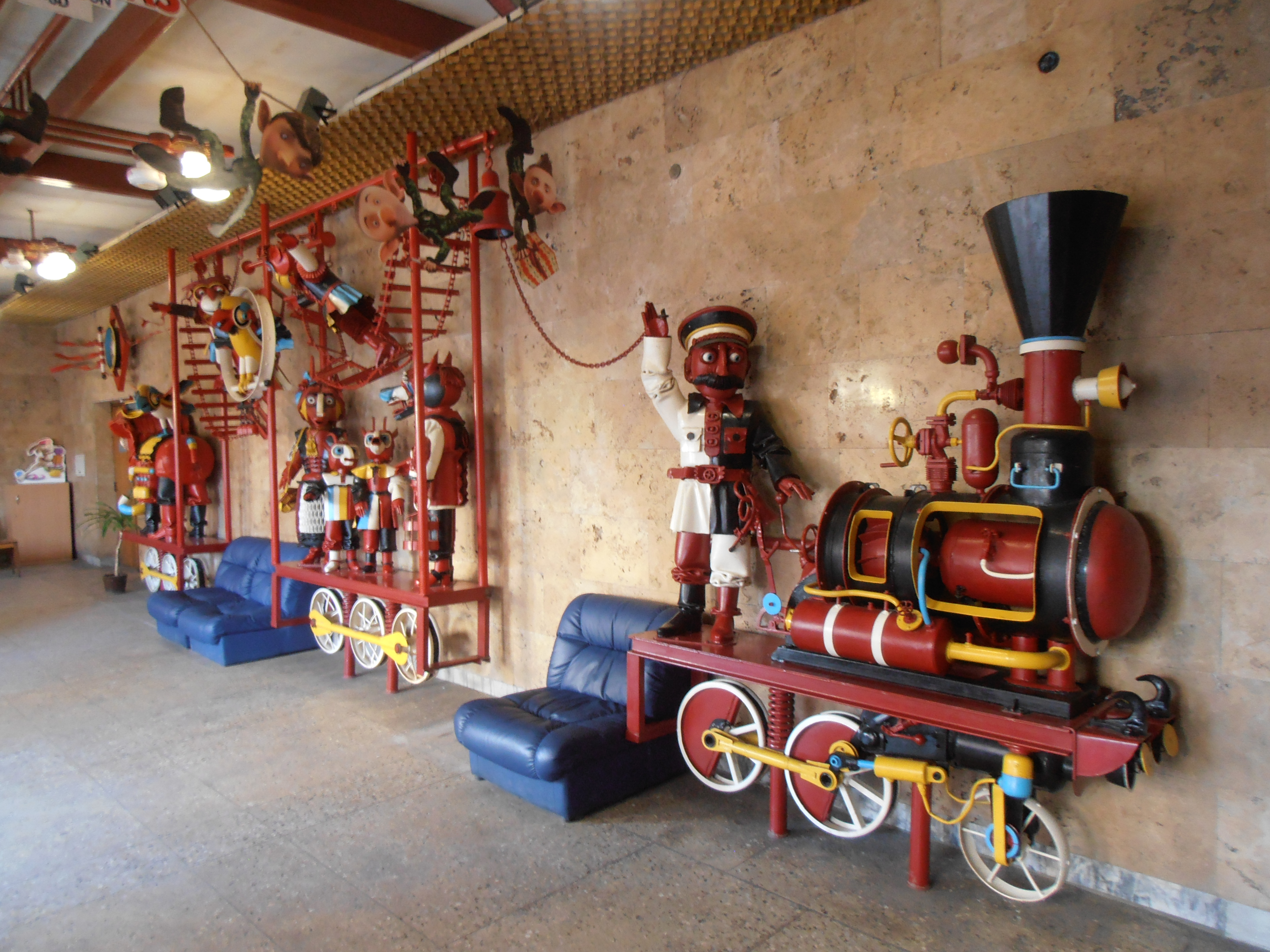 Микола Мазур. Скульптурна композиція "Веселий потяг" (метал, зварювання. 1989-1991 рр.)